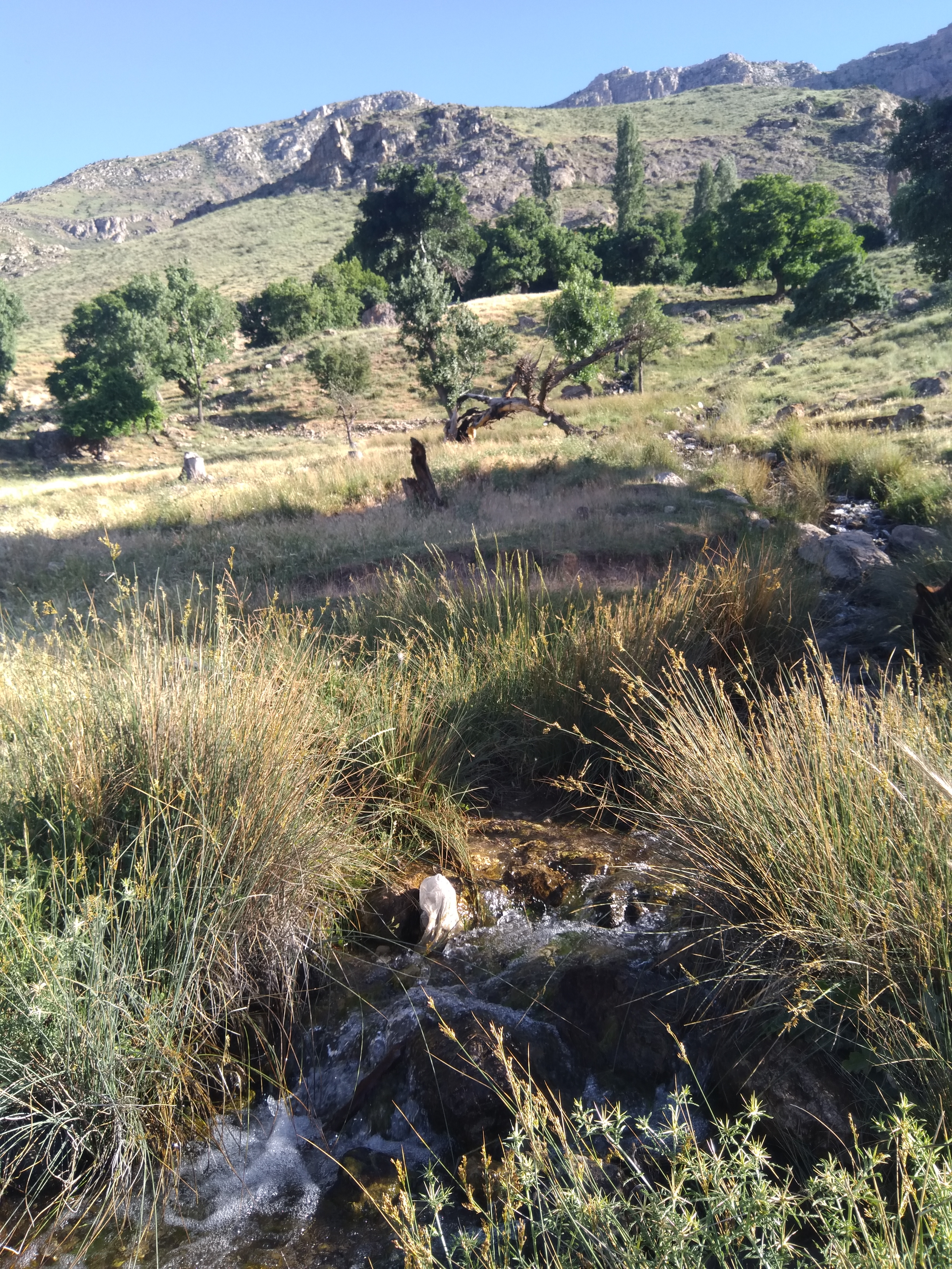 آب گوارای جاری شده از چشمه‌ی عرشه کوه